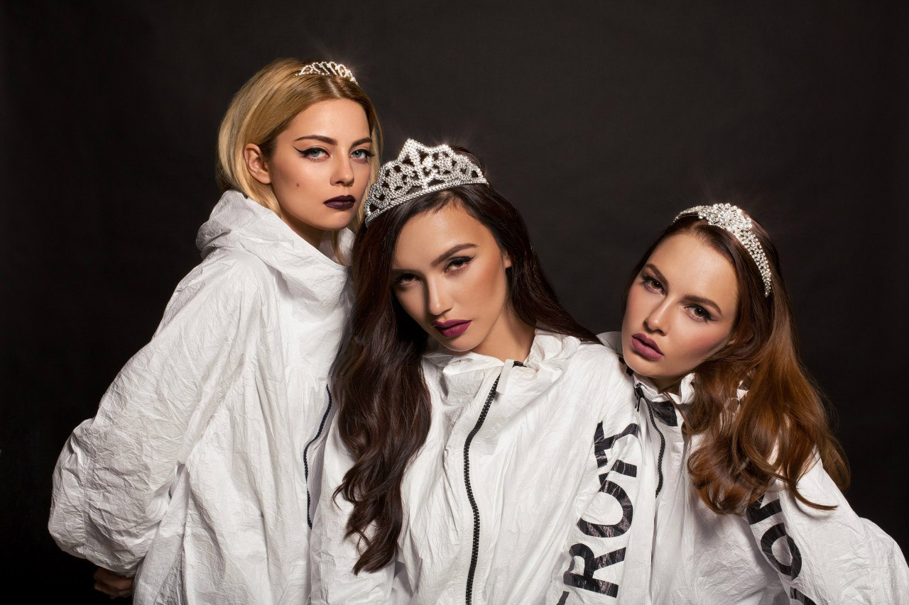 Фотосесія групи Serebro, квітень 2016